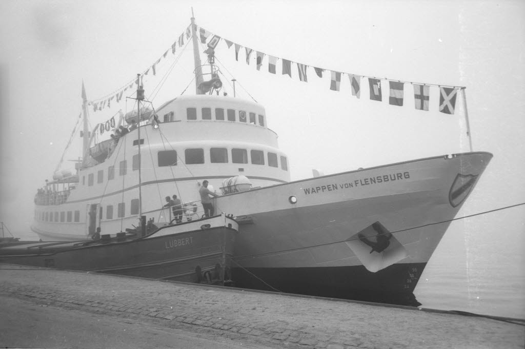 in der Holtenauer Schleuse. Das neueste Fahrgastschiff für die Flensburger Förde wird durch den Nord-Ostsee-Kanal nach Flensburg überführt.